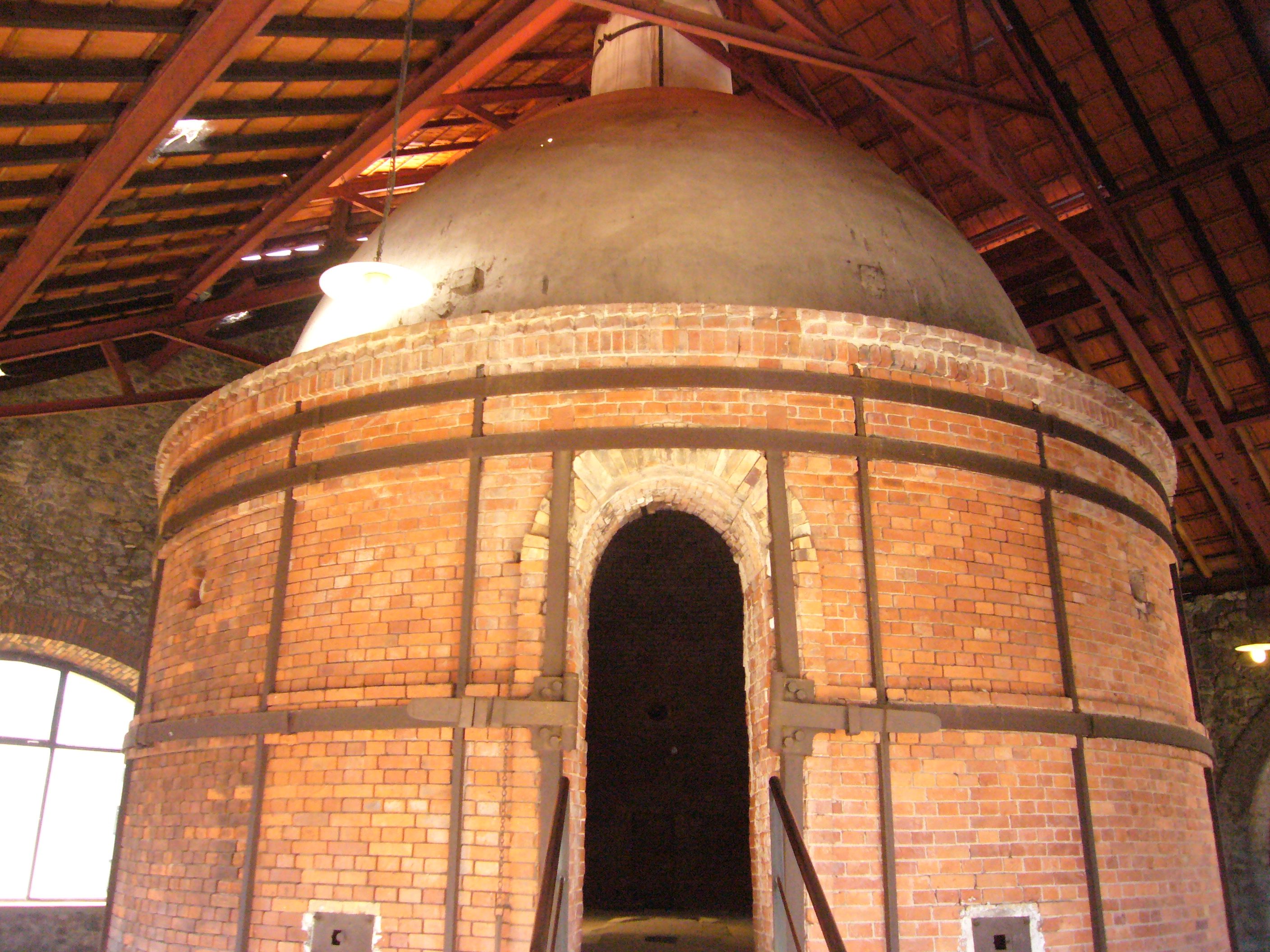 Four à porcelaine des Casseaux, Limoges, Haute-Vienne, France